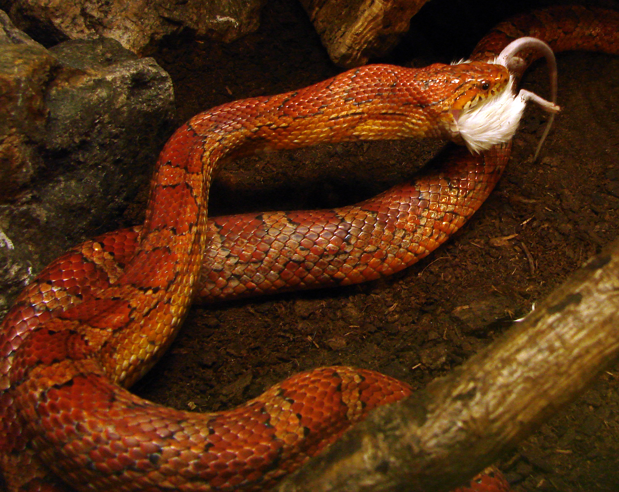 Serpent des blés (Pantherophis guttatus, Sud-Est des Etats-Unis) en train de manger une souris, dans un terrarium. La souris lui est donnée déjà morte. Il s'enroule autour de sa proie puis l'avale en commençant par la tête, ce qui ne prend que quelques minutes. Il est présenté à l'Ile aux Serpents.